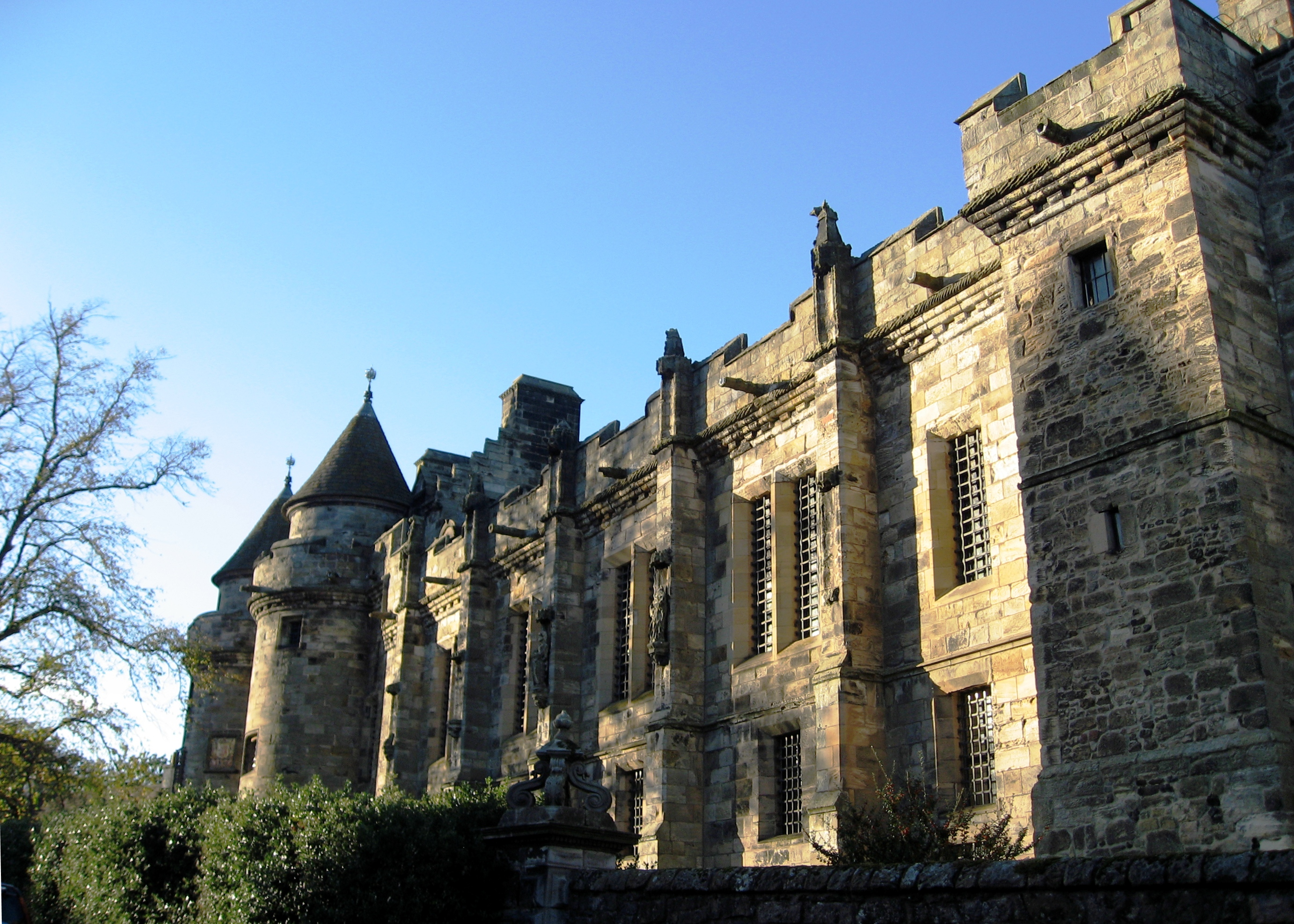 Falkland Palace